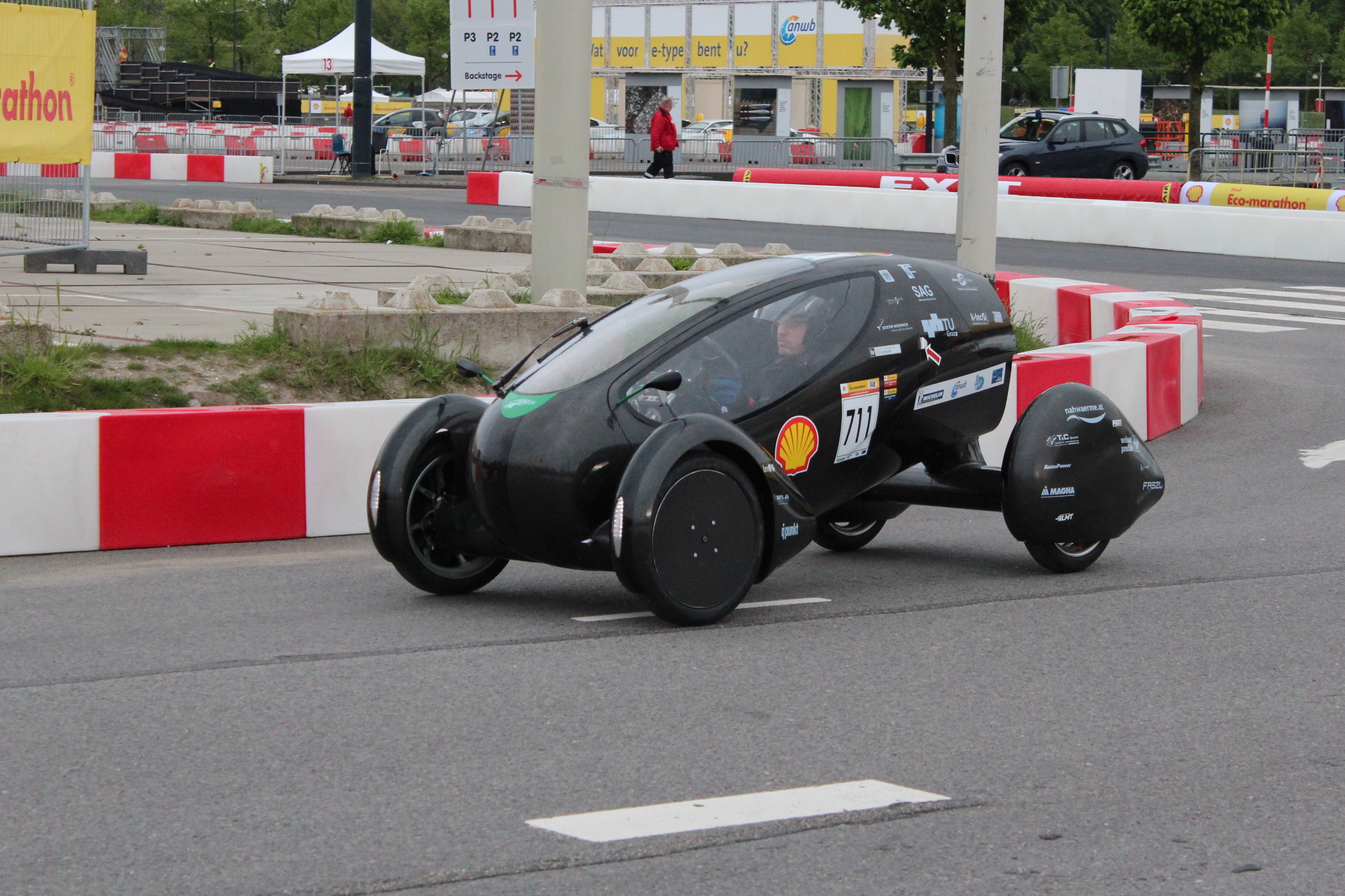 Das Urban Concept Car Panther I bei seiner Wertungsfahrt am Shell Eco-Marathon 2012 in Rotterdam.